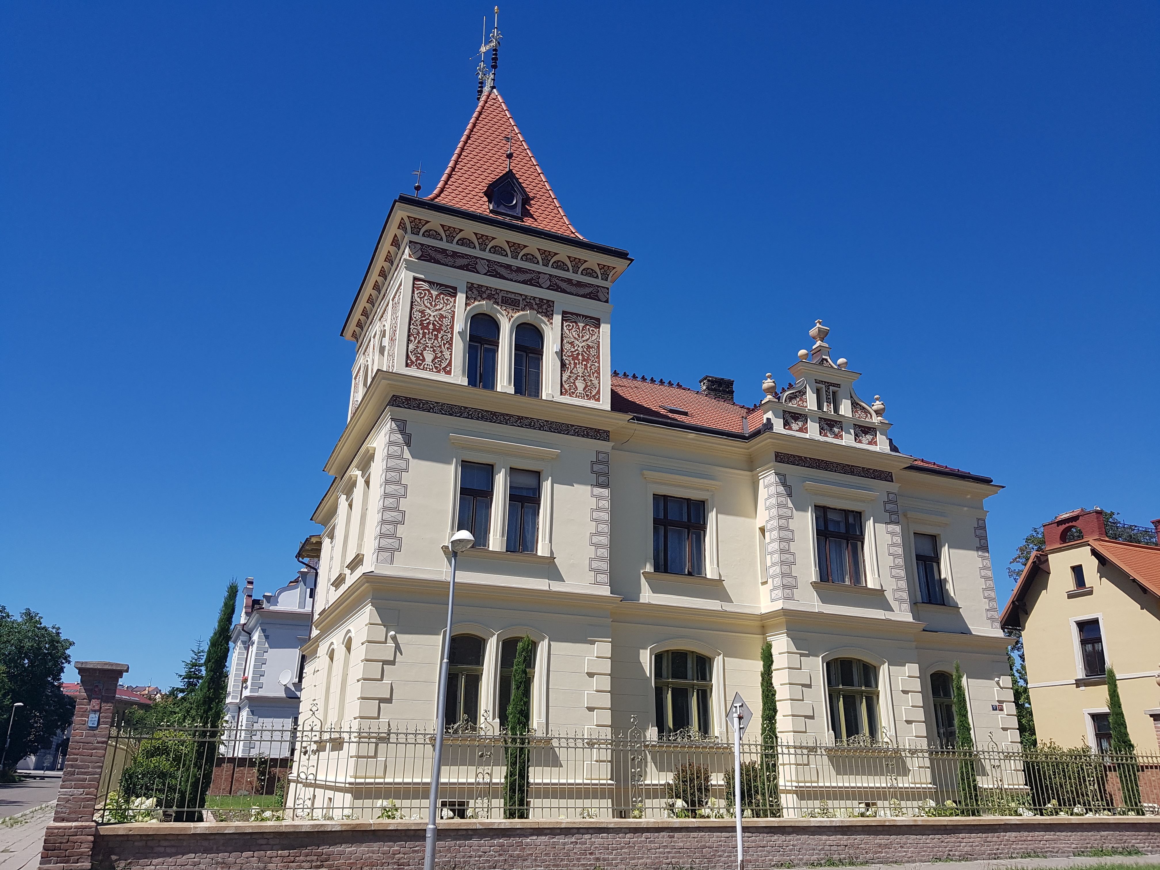 Wiplerova vila v Hradci Králové po rekonstrukci (2020)